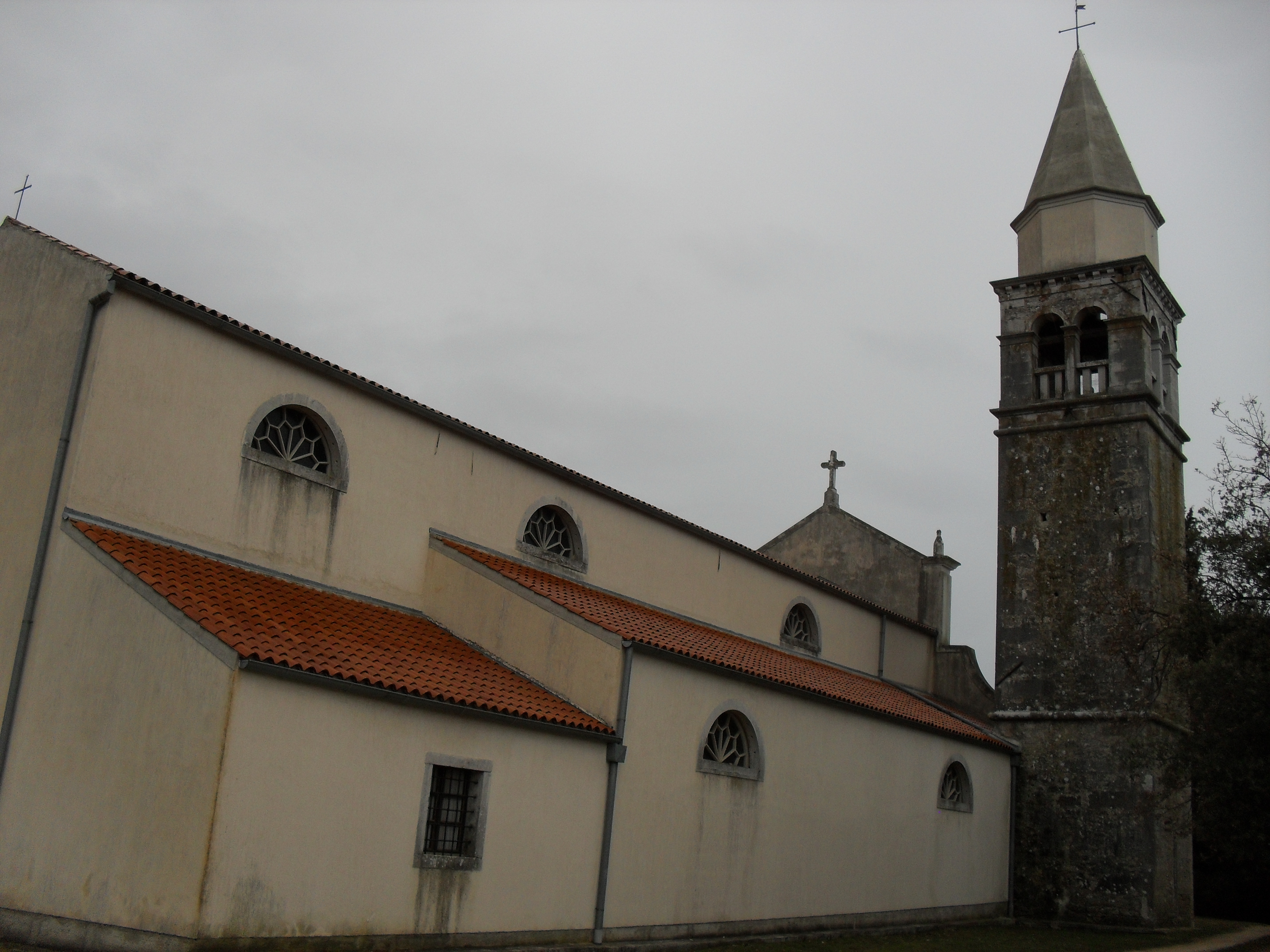 crkva Sv. Roka